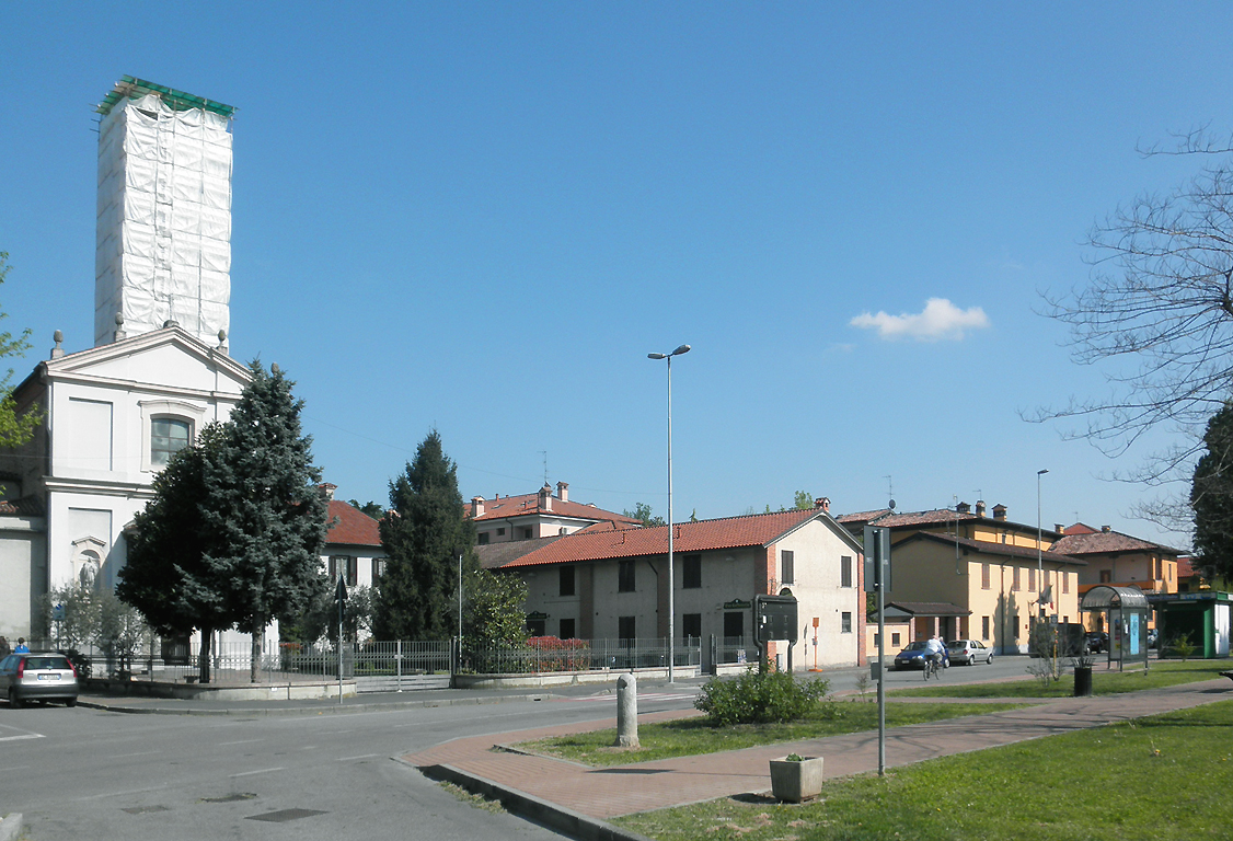 Vista del centro abitato di Civesio, frazione del comune di San Giuliano Milanese.